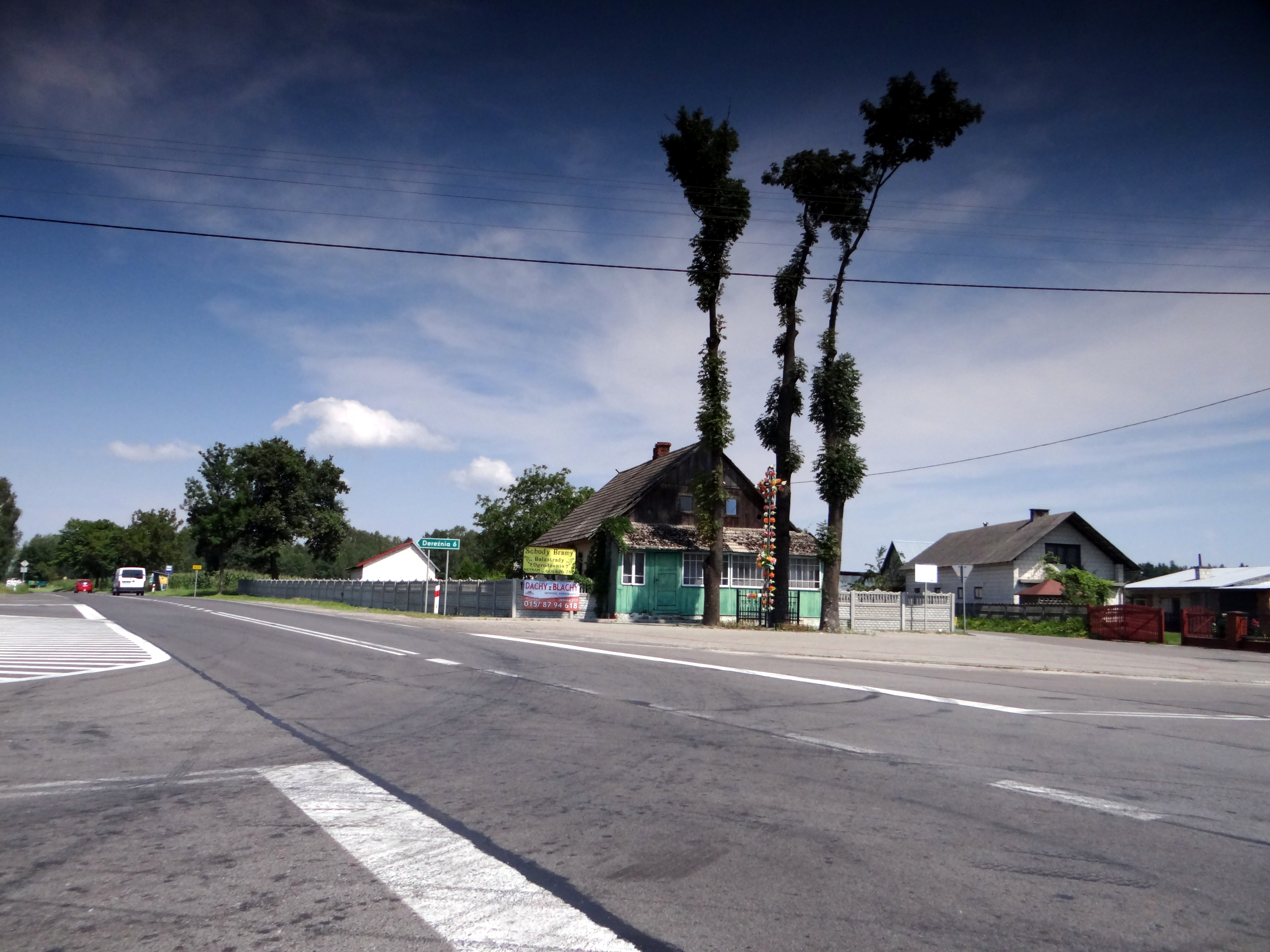 Majdan Nowy - krzyż przydrożny